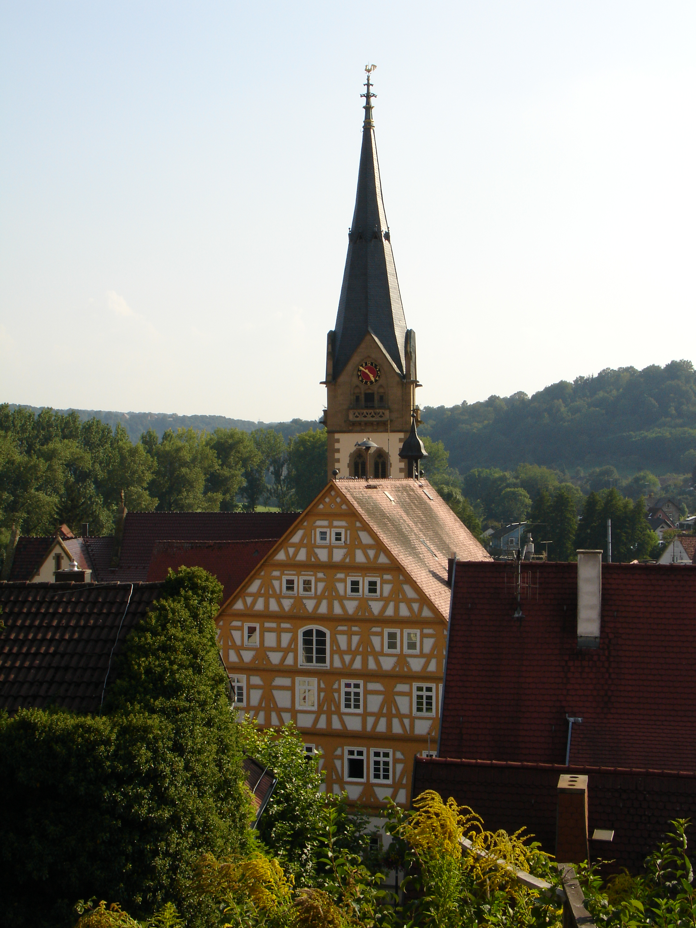 Blick auf die Innenstadt von Möckmühl